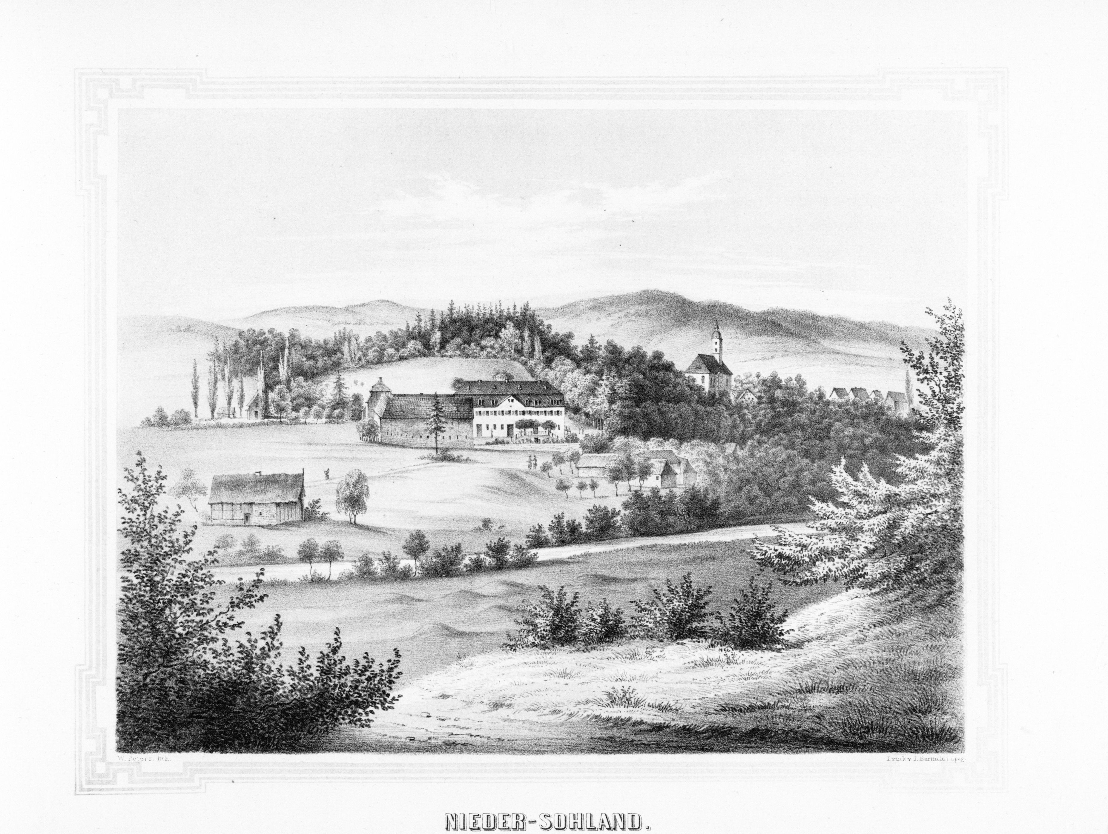 Nieder - Sohland aus: Album der Rittergüter und Schlösser im Königreiche Sachsen Markgrafenthum Oberlausitz Section: III